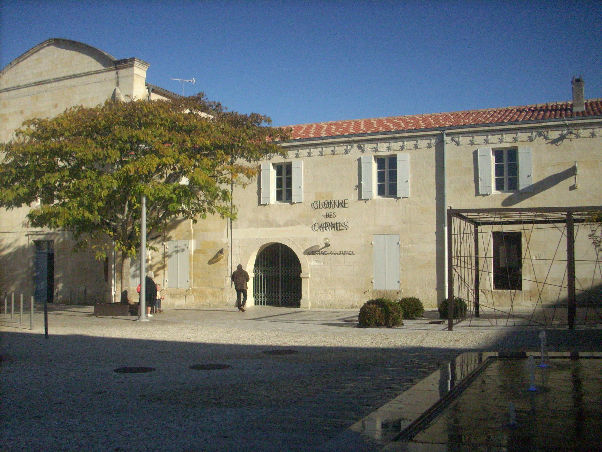 Cloitre des Carmes, Jonzac, France. Extérieur.